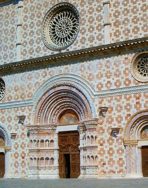 l'Aquila, Santa Maria di Collemagio Picture taken by user:Idéfix, july 2003